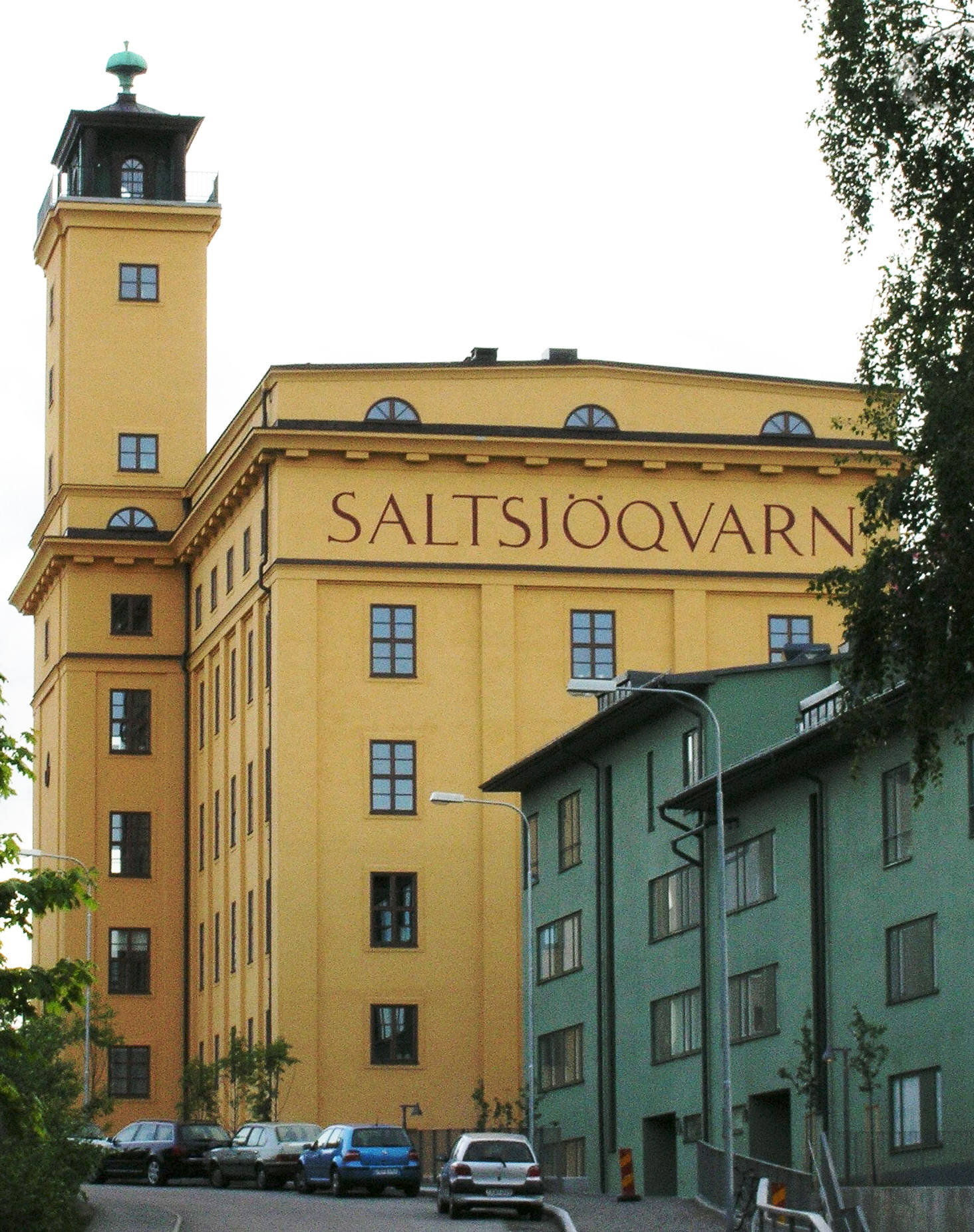 Saltsjöqvarn, Mannagrynskvarnen i Nacka.